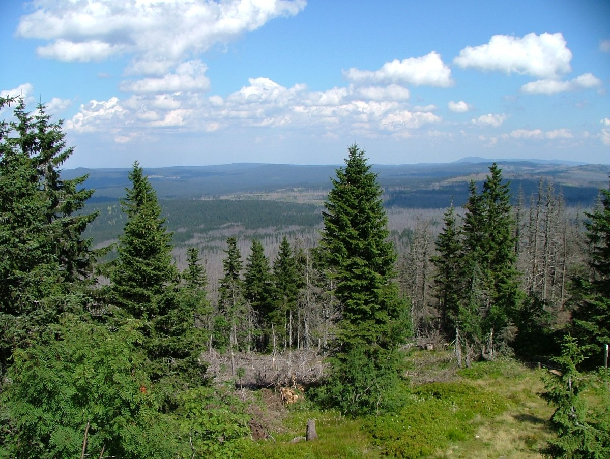 Beschreibung: Mittelgebirgslandschaft des Bayerischen Waldes, großflächige Waldschäden Quelle: fotografiert am 18.8.2004 Fotograf: Kurt seebauer Lizenzstatus: GNU FDL